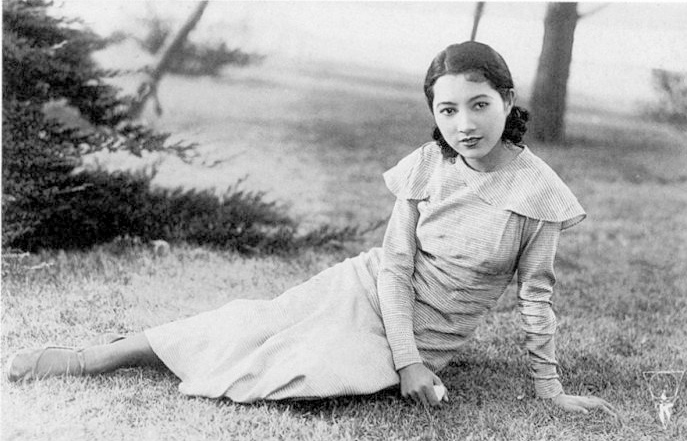 水久保澄子、1932年ころの写真